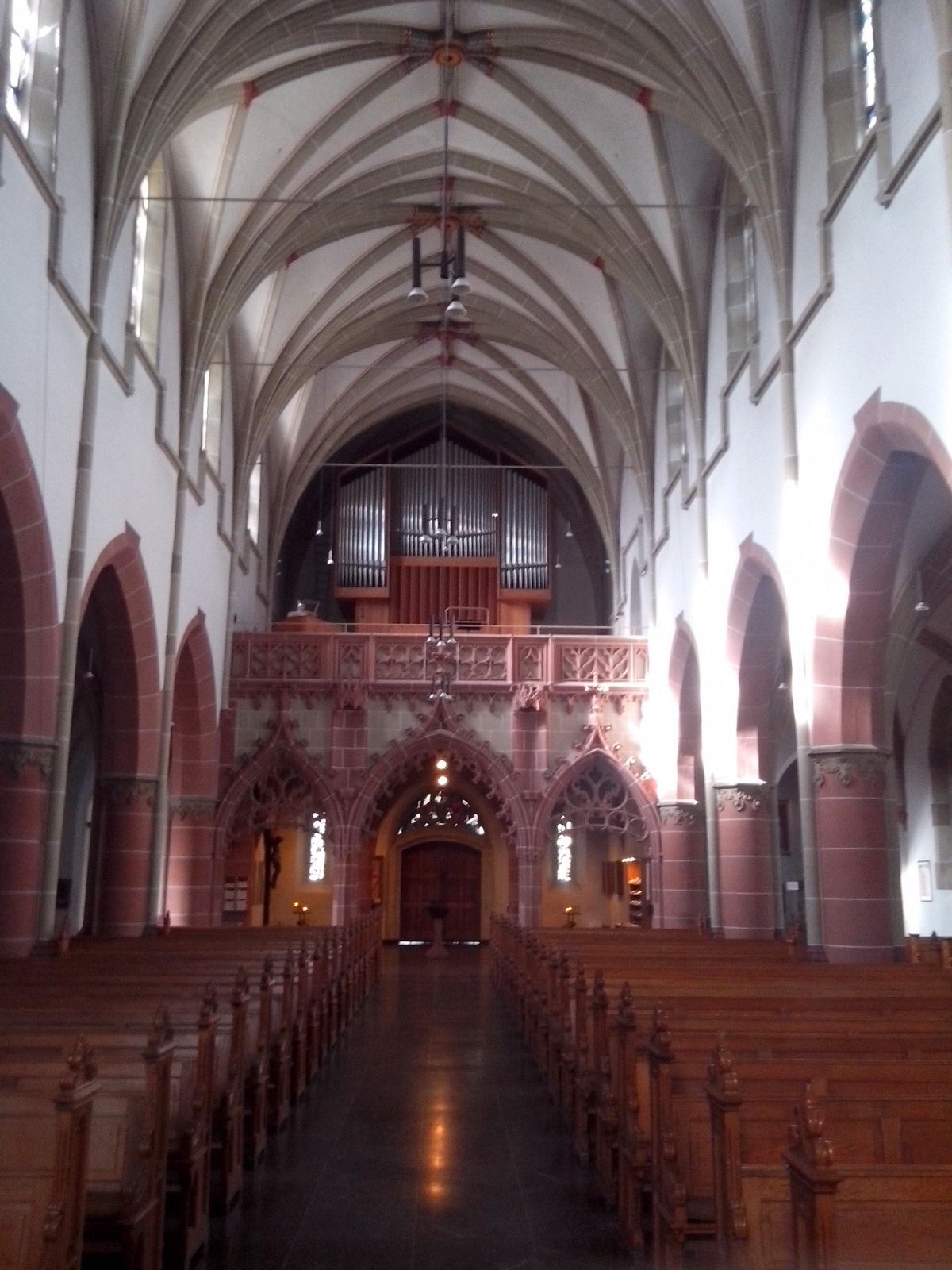 Der Innenraum der Kirche St. Mariä Empfängnis in Vohwinkel